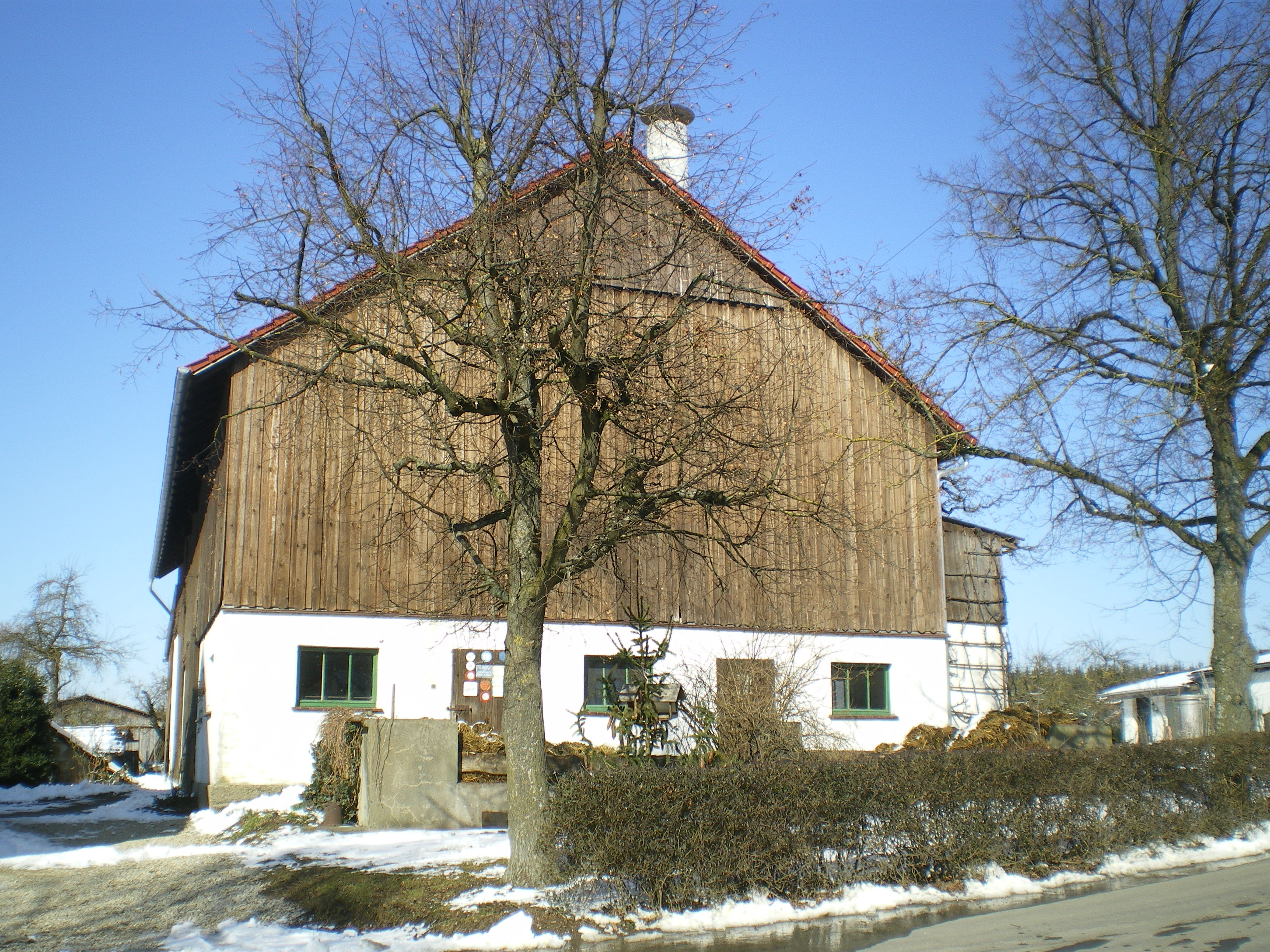 Ein Bauernhof in Roth